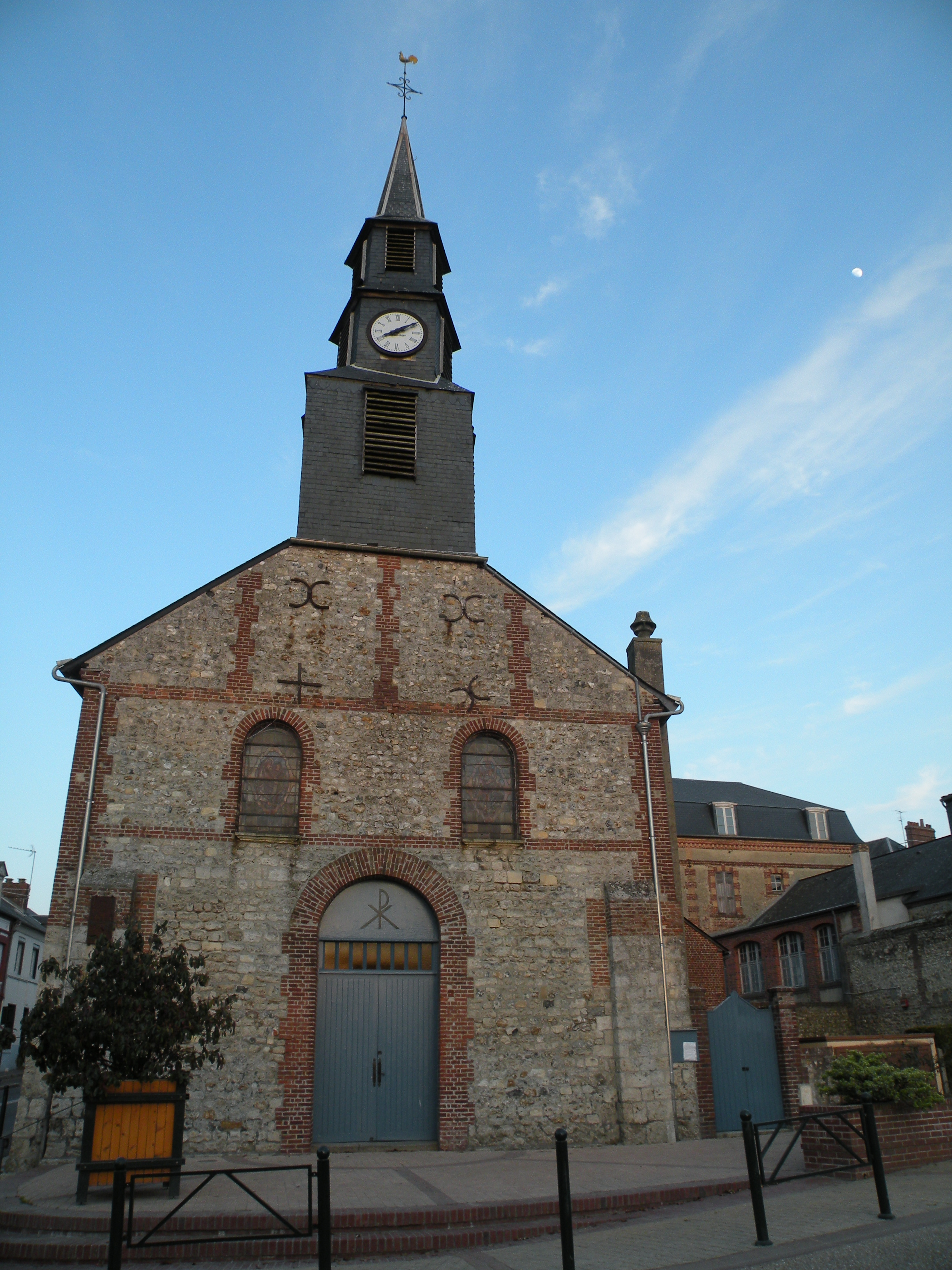 Église de La Rivière-Saint-Sauveur.